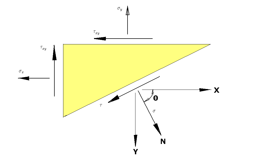 מאמצים ראשיים. הכין י.ש. 13:27, 13 יוני 2006 (IDT)